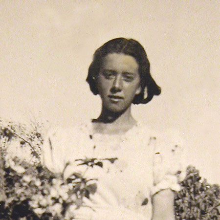 La escritora Eliana Navarro en la provincia de Cautín a los 18 años